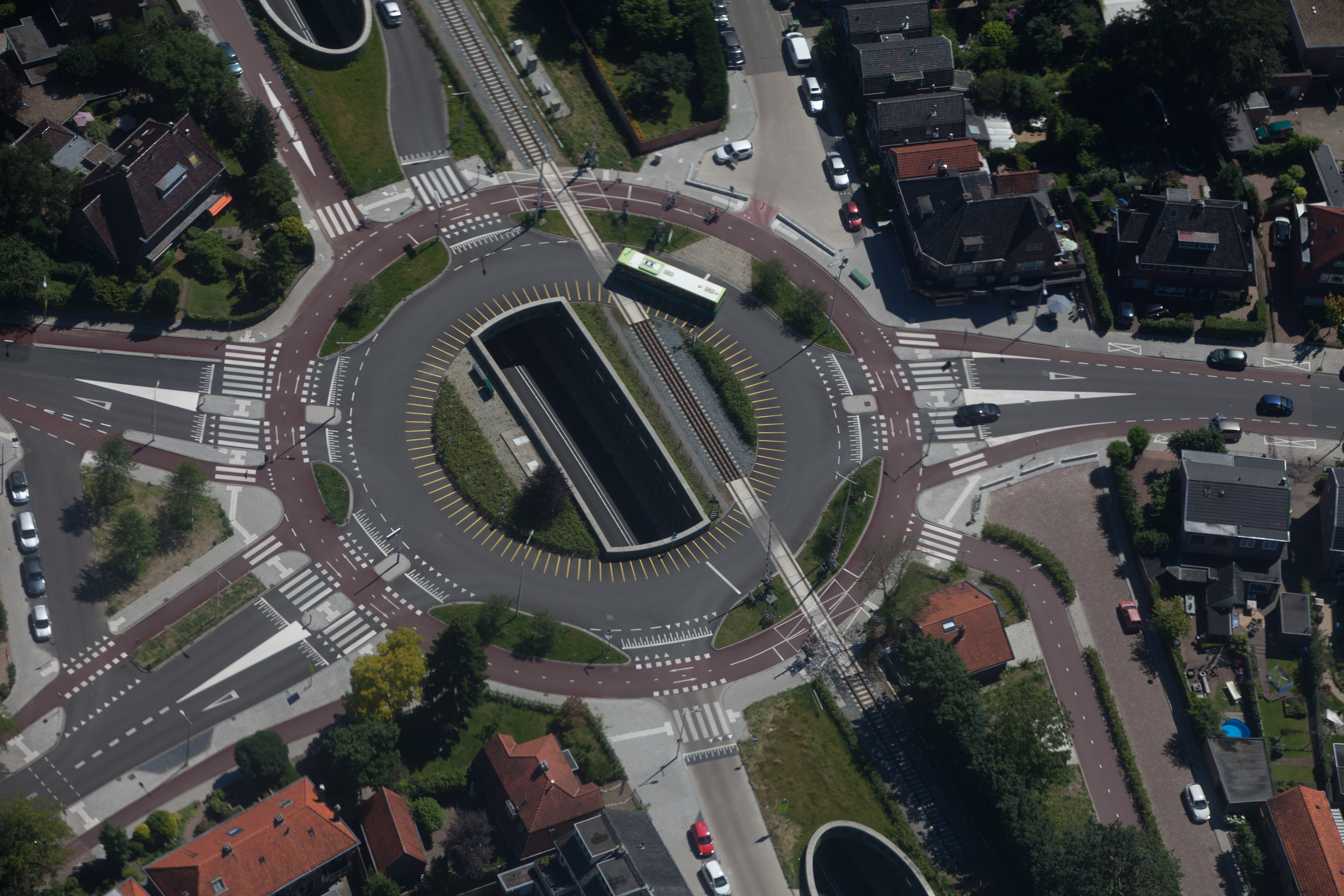 Rotonde in Amersfoort, ook bekend als de Roethof Ovatonde. De leverancier van witte, rode en gele verf heeft goede omzetten behaald